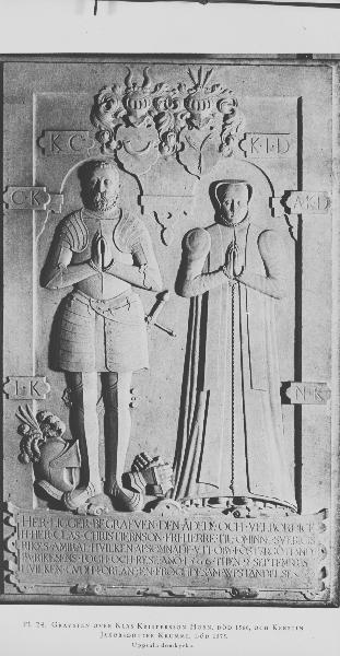 Gravsten över Klas Kristersson Horn och hans hustru Kerstin Krumme. Kategori: (09) Gravar Gravsten över Klas Kristersson Horn och hans hustru Kerstin Krumme.